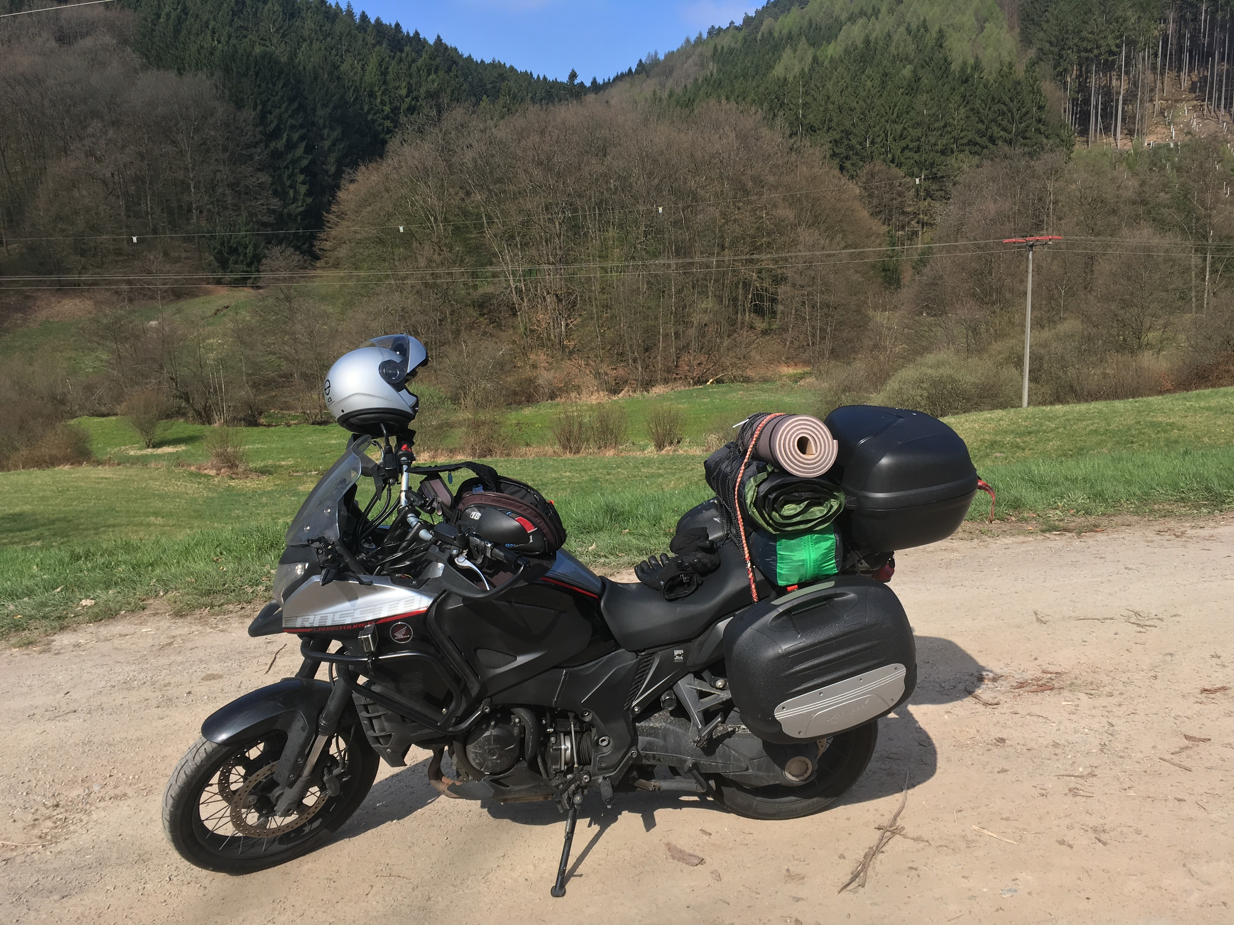 Volle Beladung